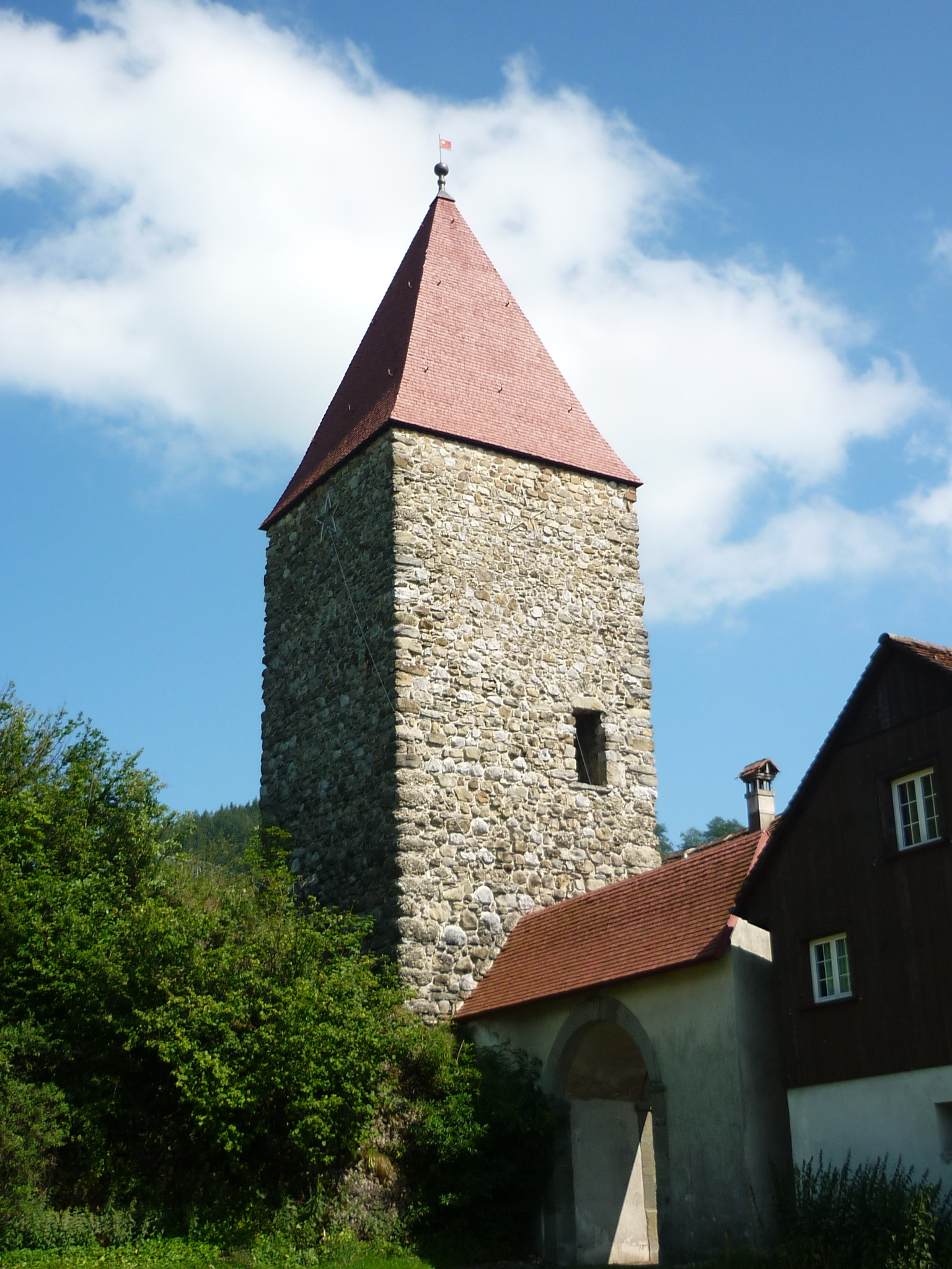 Roter Turm in Rothenthurm SZ, Schweiz